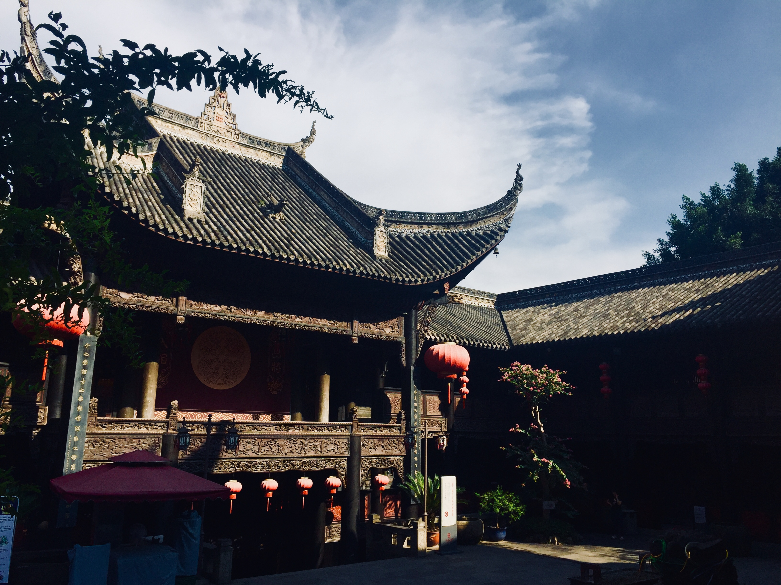 重庆湖广会馆戏楼